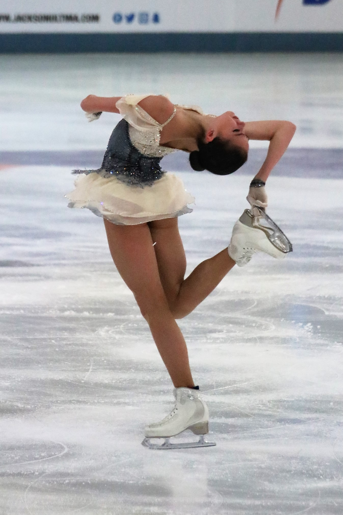 Алина Загитова на чемпионате России по фигурному катанию на коньках 2019